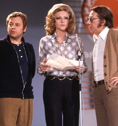 I presentatori del Festival di Sanremo 1972